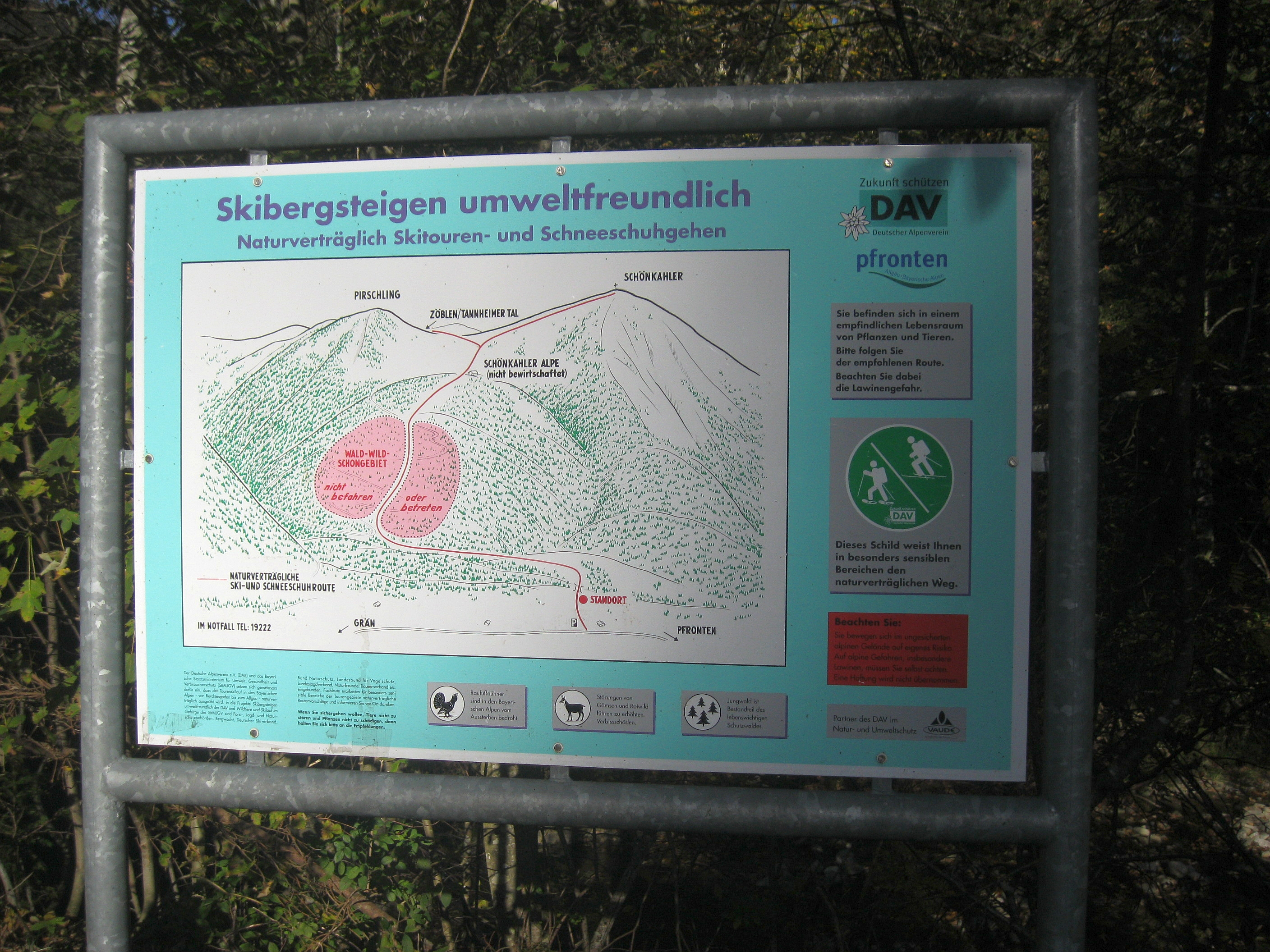 Hinweisschild am Ostfuß des Schönkahlers im Engetal in den Tannheimer Bergen